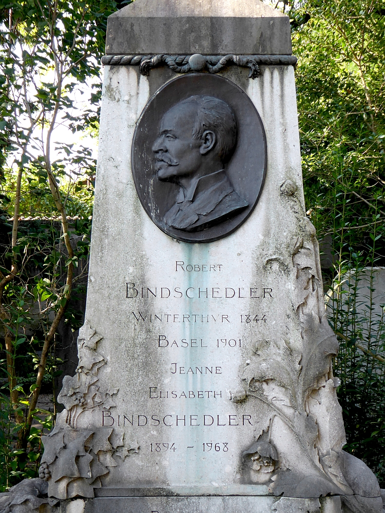 Robert Bindschedler, 1844-1901, Portrait auf dem Friedhof Wolfgottesacker, Basel